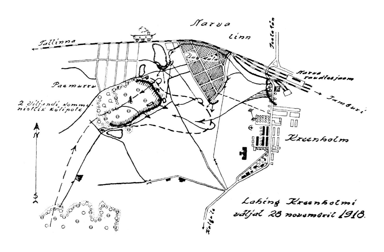 Joala lahingu skeem.